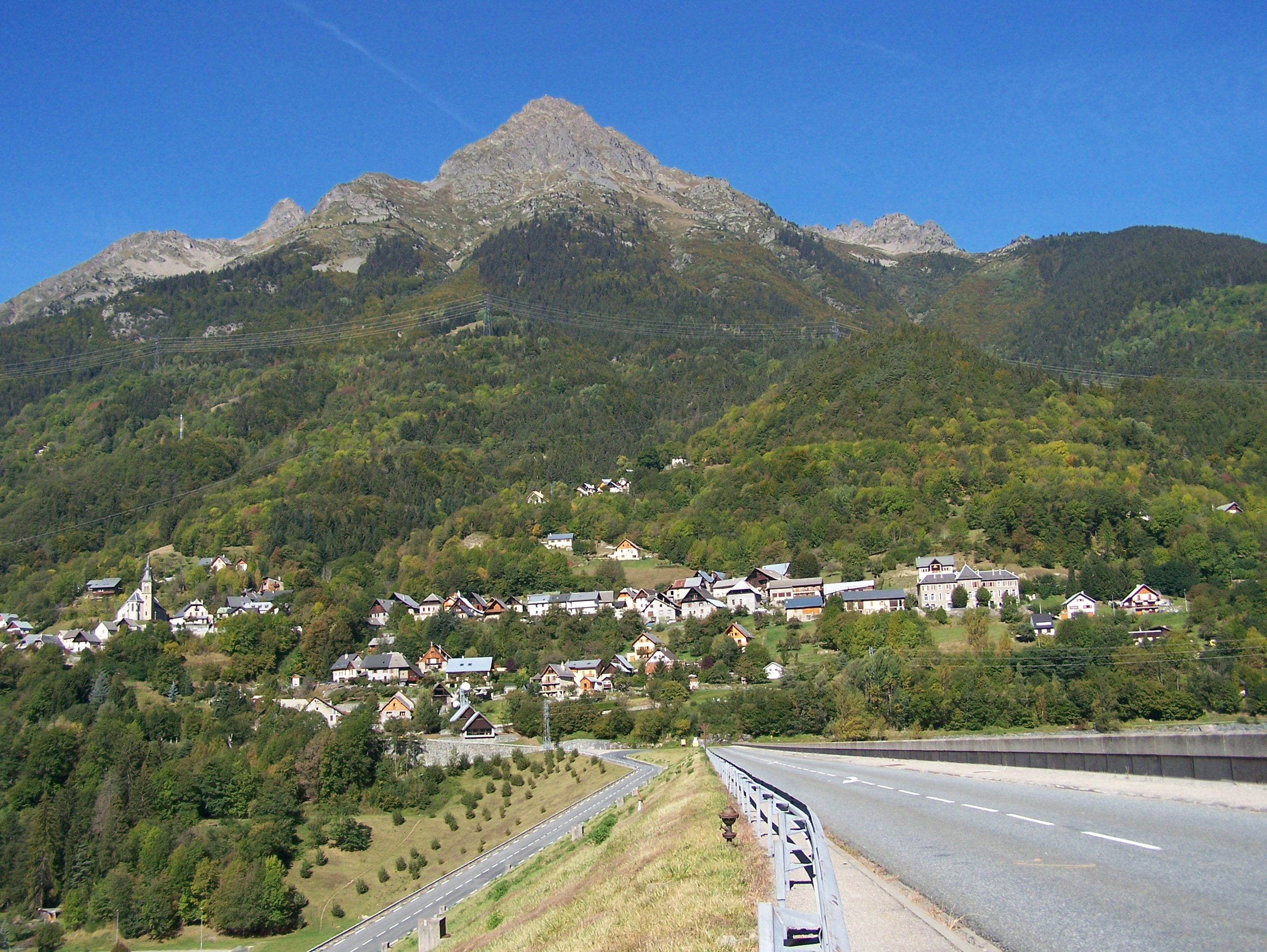 Allemond vue générale